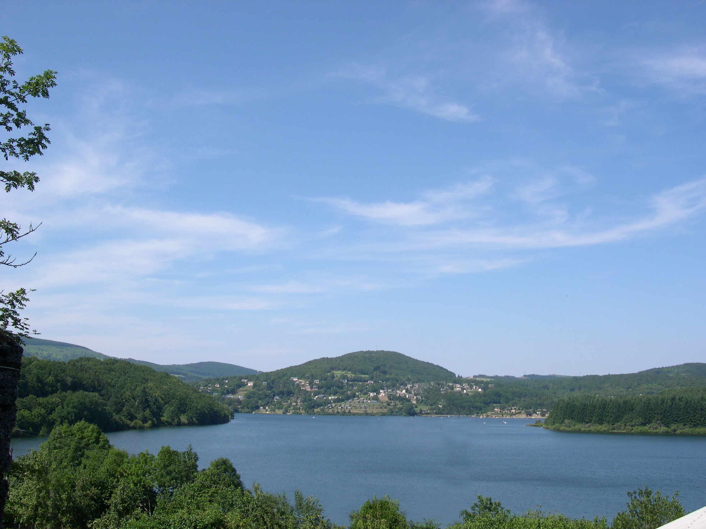 Nages (Tarn) - Lac du Laouzas et centre de loisir de Rieumontagné.